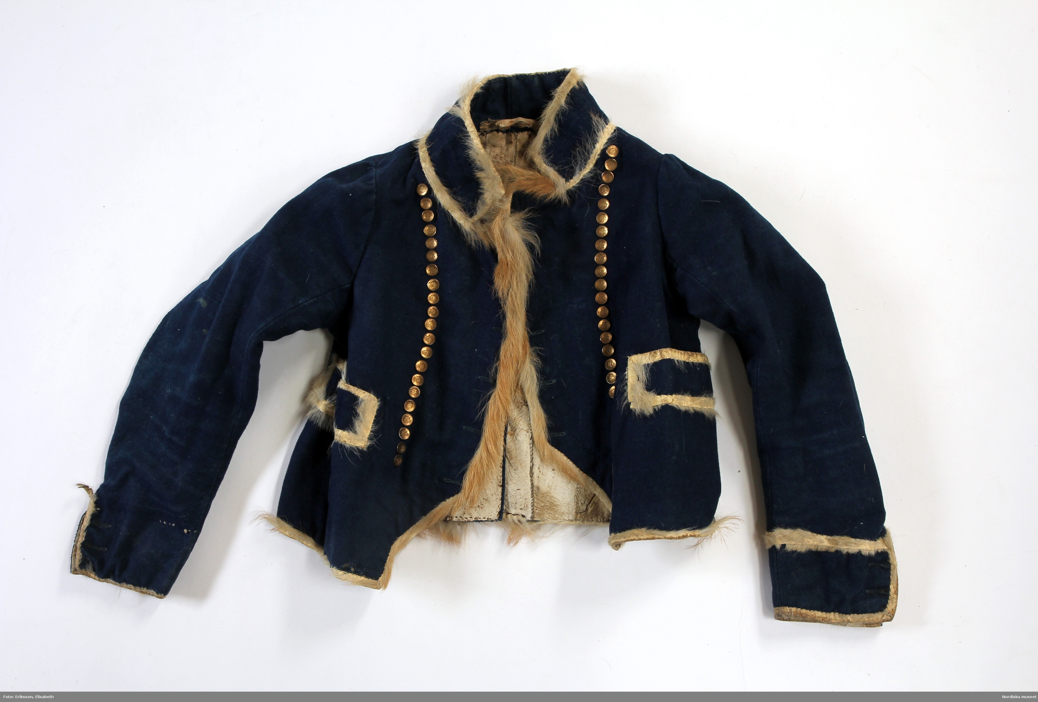 Jacka